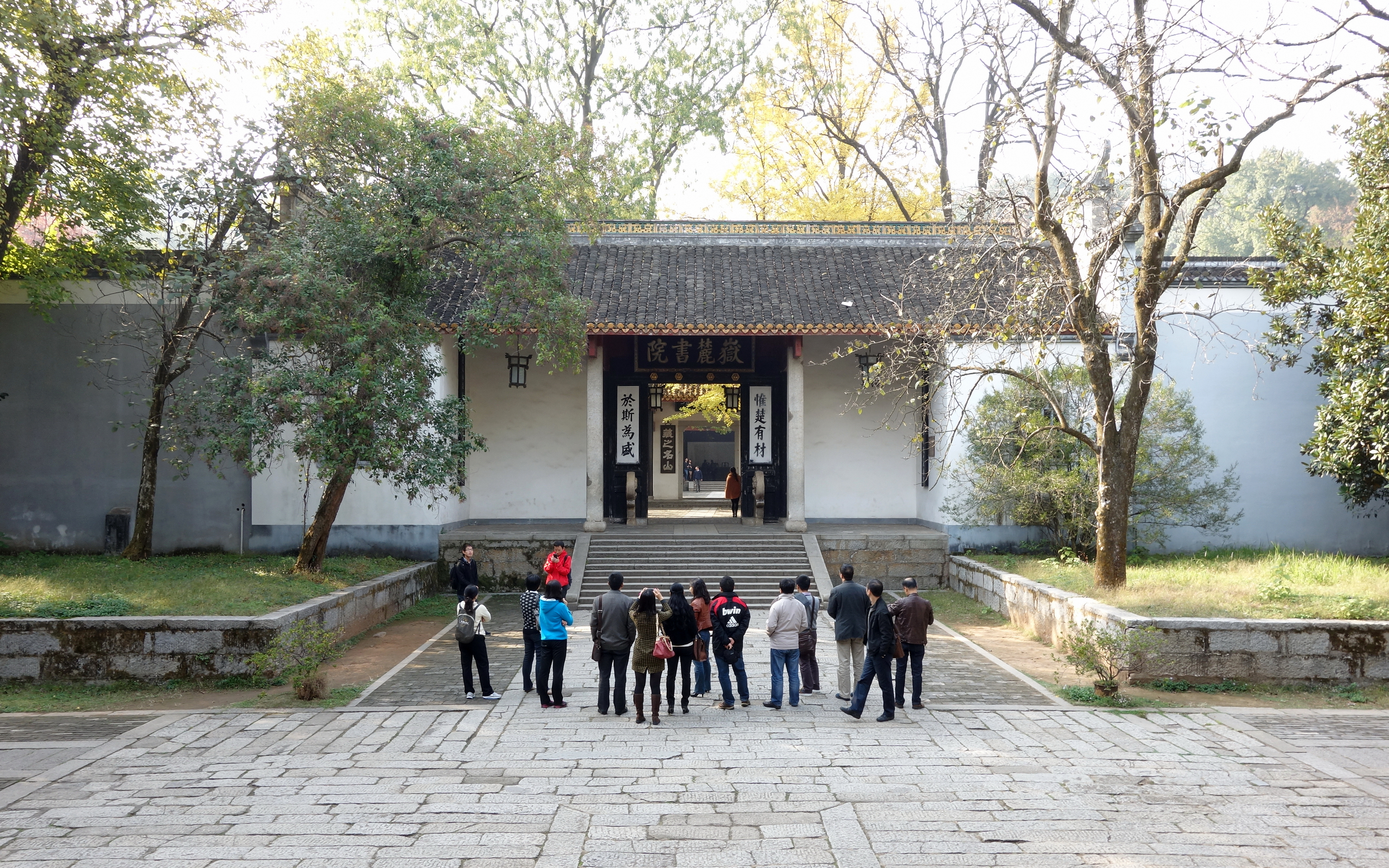 岳麓书院大门